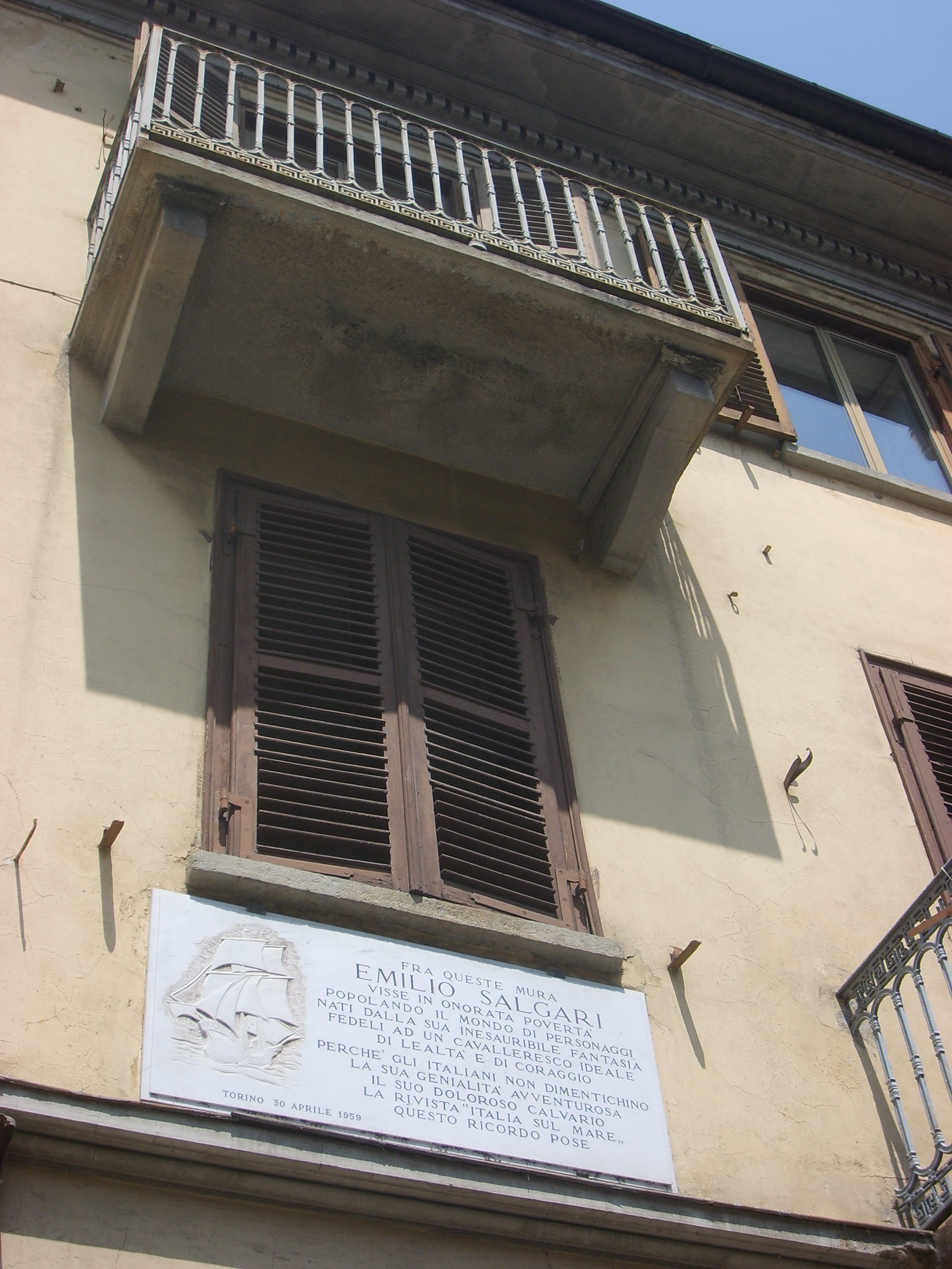 facciata della casa di Salgari a Torino (corso Casale 205)